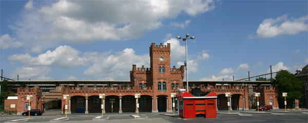 Station Aalst, eigen foto augustus 2004, hiermee onder GFDL gebracht